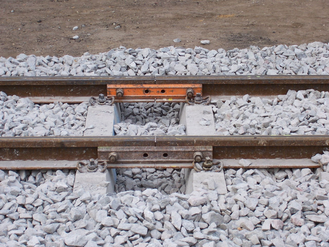 rail joint